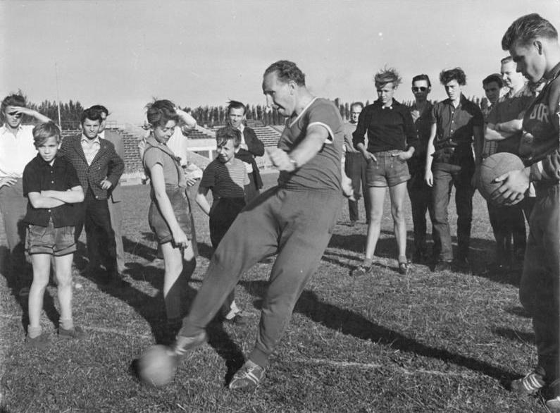 Zentralbild-Zastrow Za-L 22.6.59 Treffpunkt Olympia - DDR Nationalspieler beim Nachwuchs - Am 22.6.1959 beim Treffpunkt Olympia im Berliner Jahn Stadion, waren unsere Fußball Nationalspieler der Hauptanziehungspunkt für unsere Jugendlichen. Unseren Nationalspielern steckte noch die Niederlage gegen Portugal in den Knochen, doch das Vertrauen unserer Jugend brachte ihnen auch bald das Selbstvertrauen wieder. UBz: Staatstrainer Gödicke zeigt den Jungen, wie man zum Torschuss ansetzt. (Rechts) Vogt von der Nationalmannschaft.